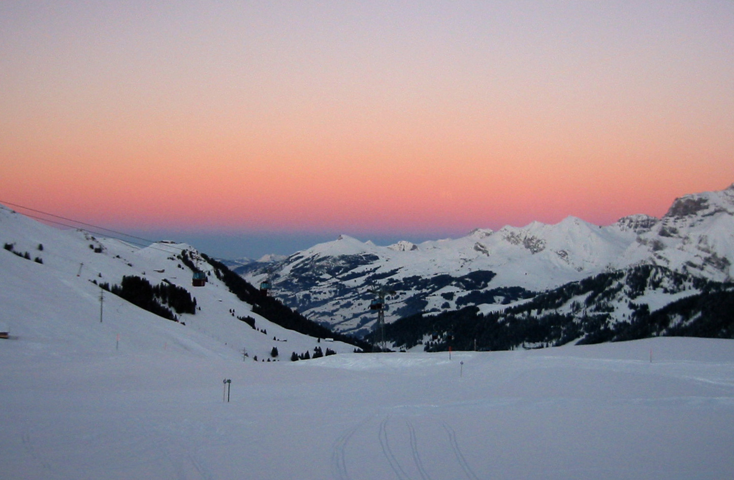 Dämmerung (Abenddämmerung) vom Hahnenmoospass bei Adelboden aus gesehen